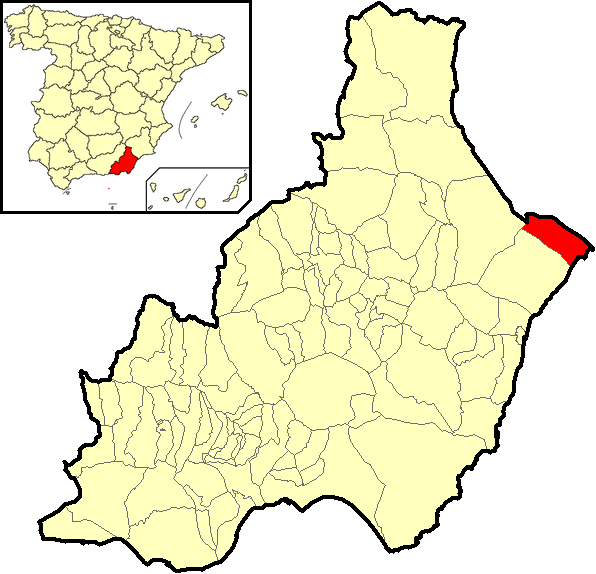 Situación del término municipal de Pulpí respecto a la provincia de Almería, en España.